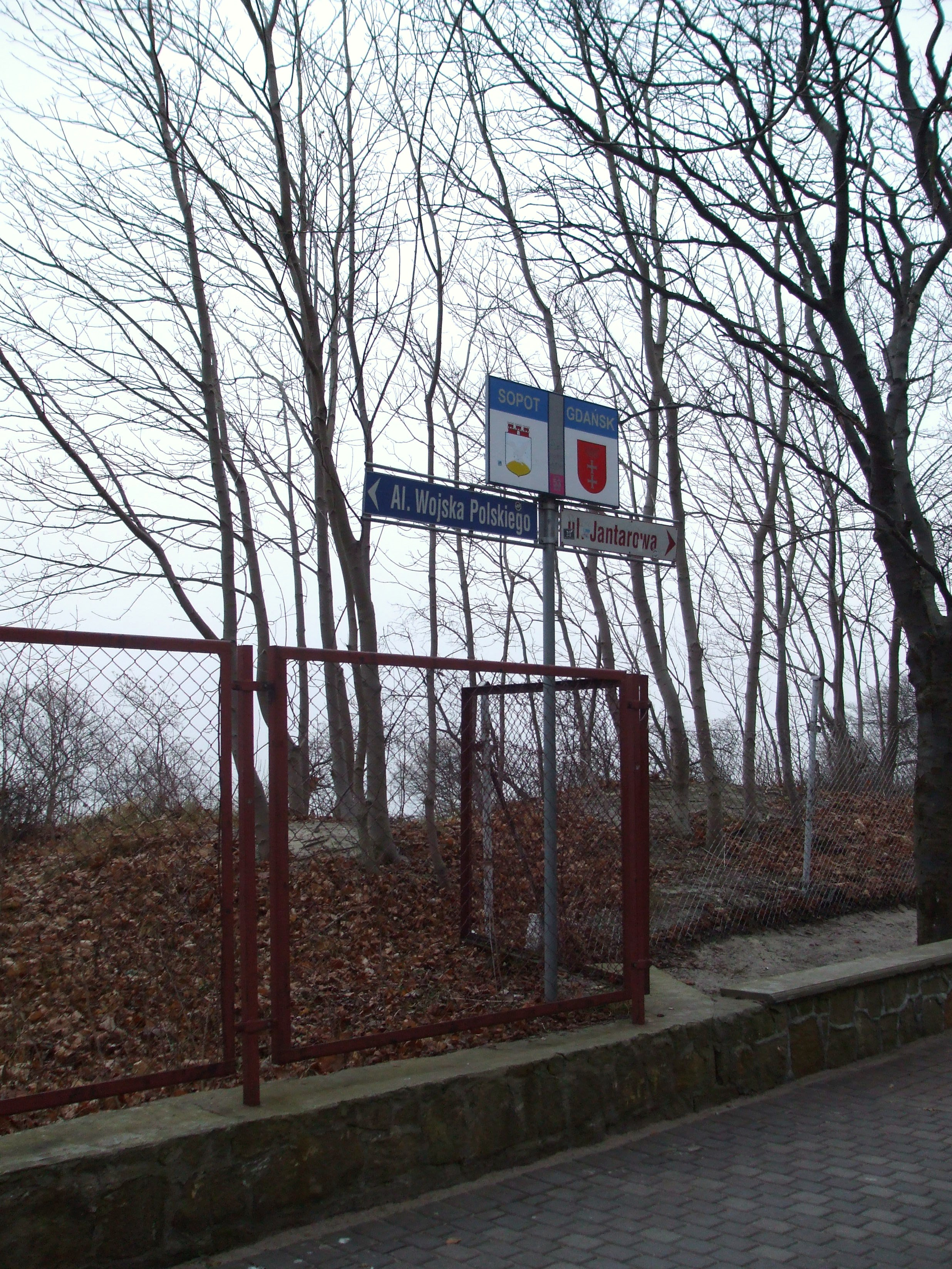 Granica Gdańska i Sopotu.